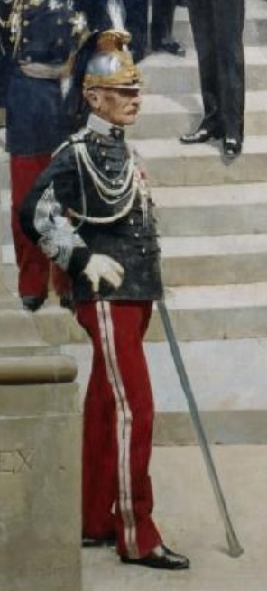 Le colonel Lichtenstein : détail d'un fragment - conservé au Musée Carnavalet - de L'Histoire du siècle, panorama de 20 m de haut et 120 m de long réalisé par Henri Gervex et Alfred Stevens (1889).